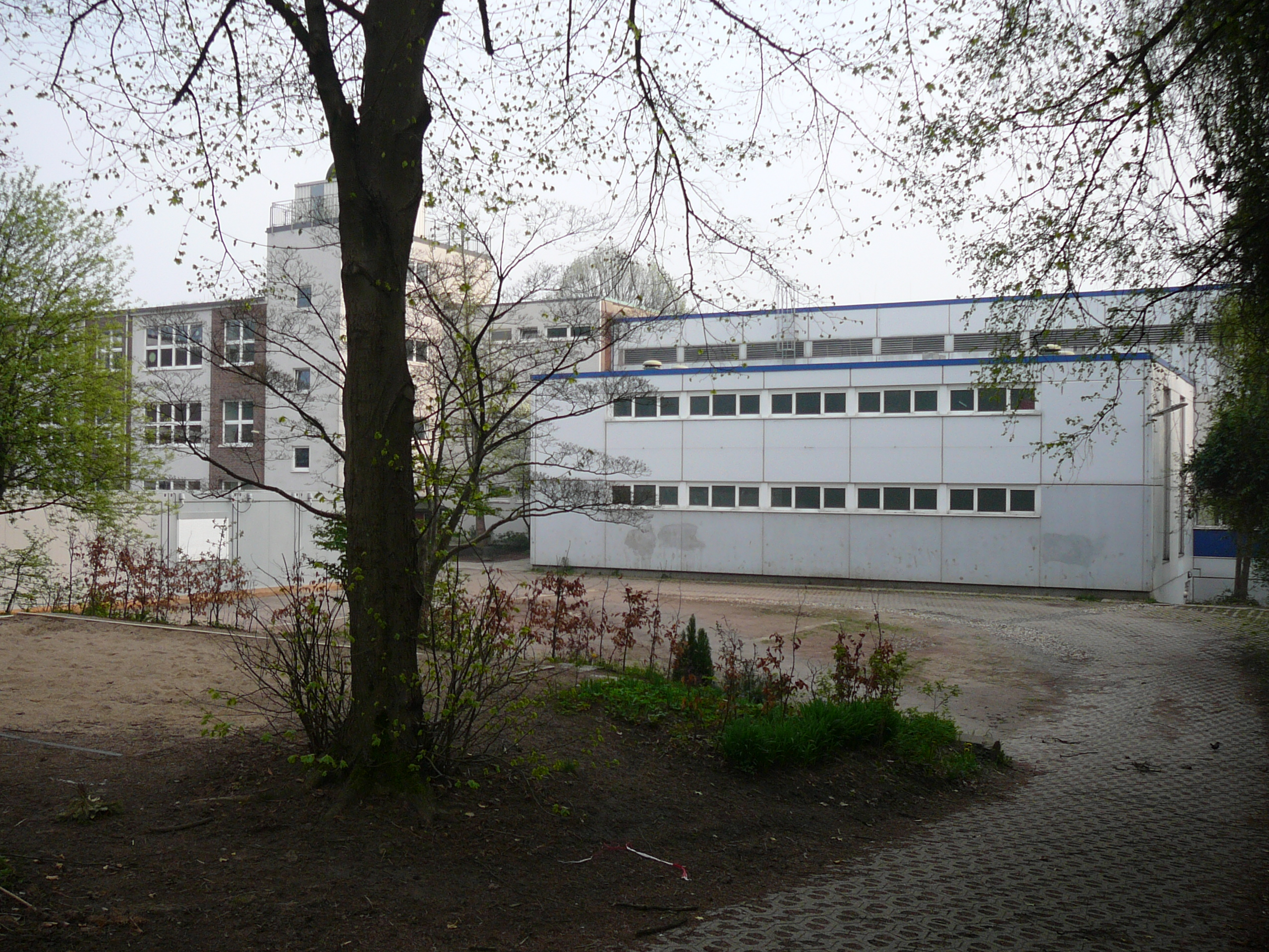 Bayreuther Straße, Wuppertal